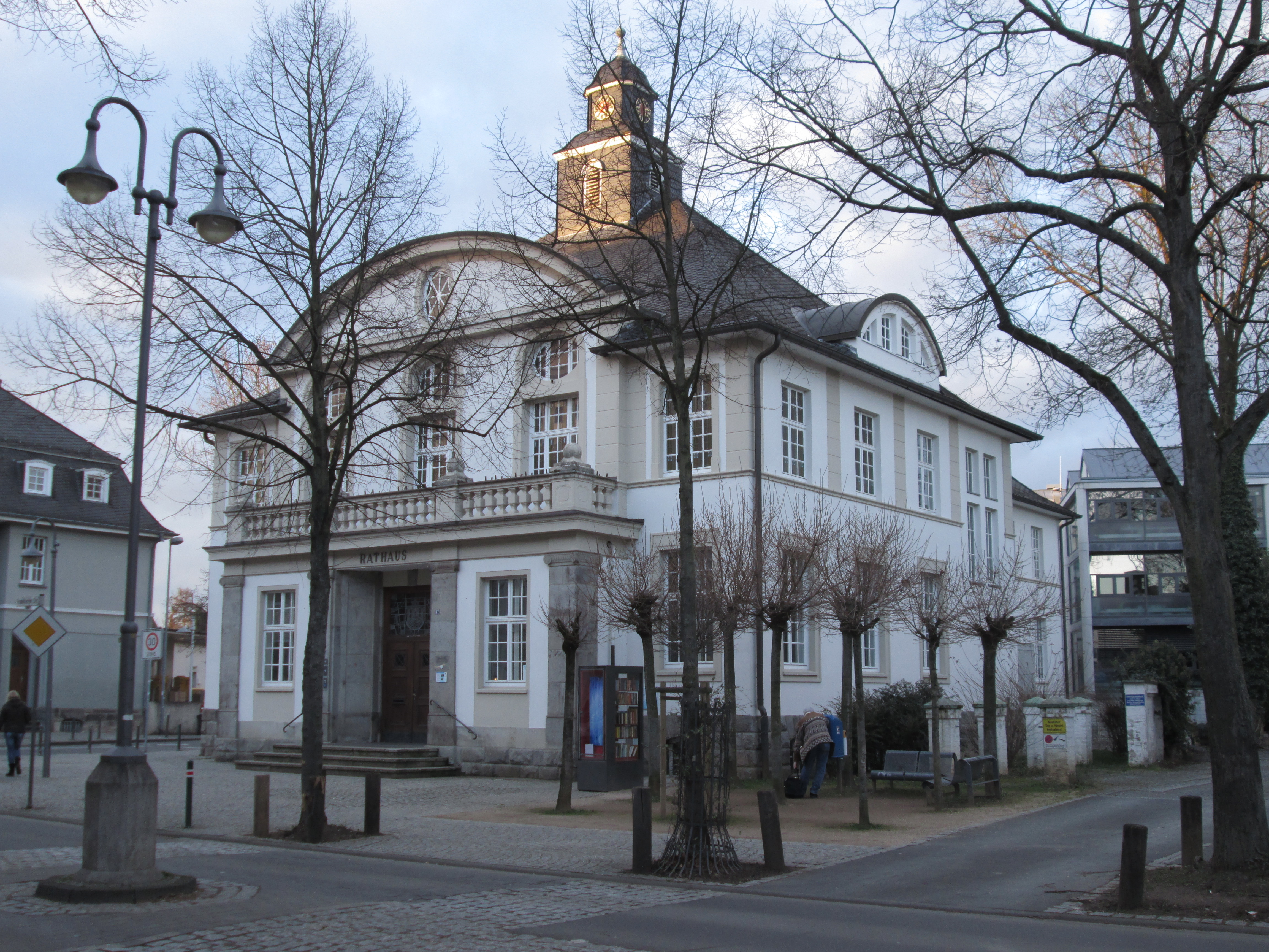 Altes Rathaus, Hennef(Sieg)